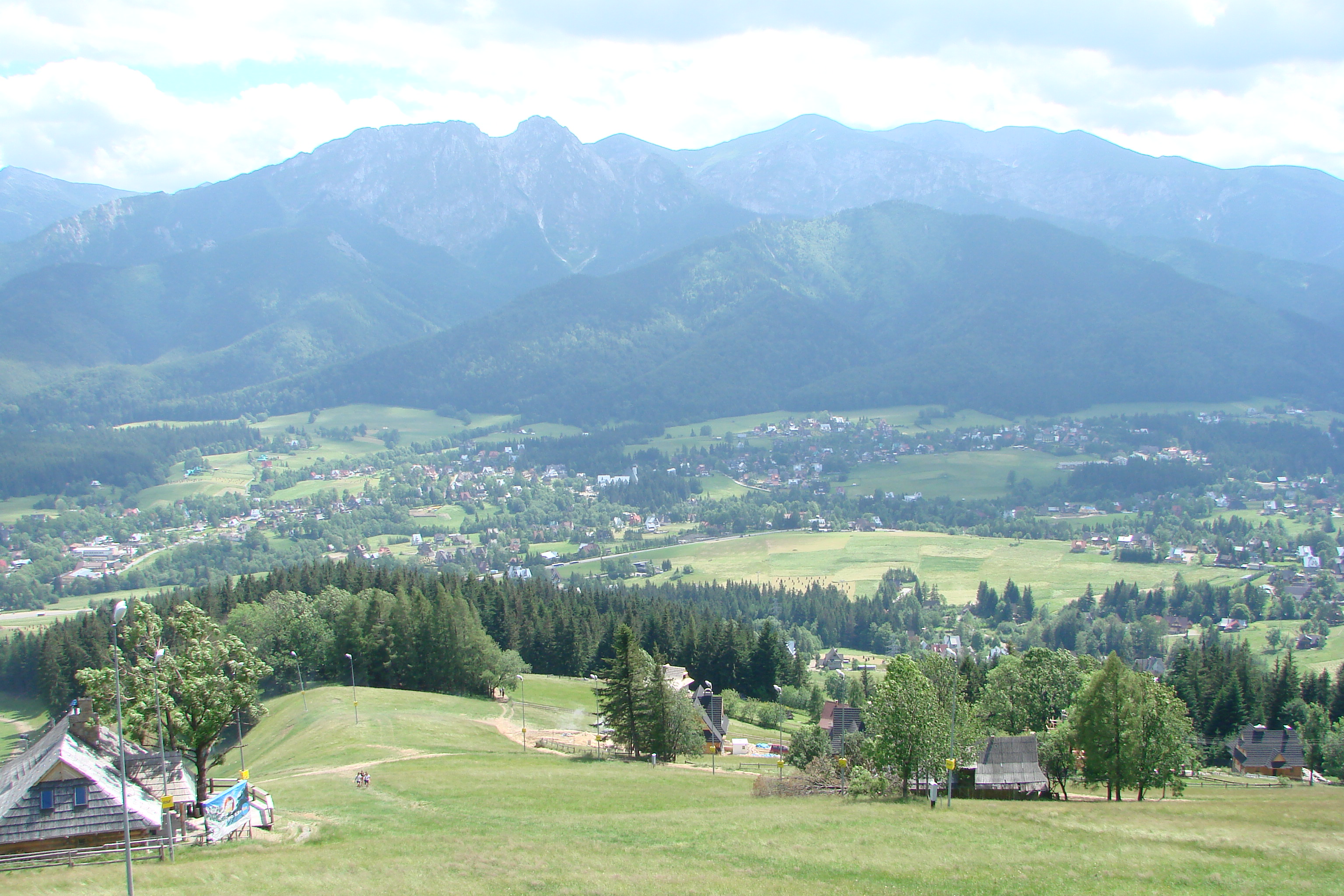 Zakopane, Poland